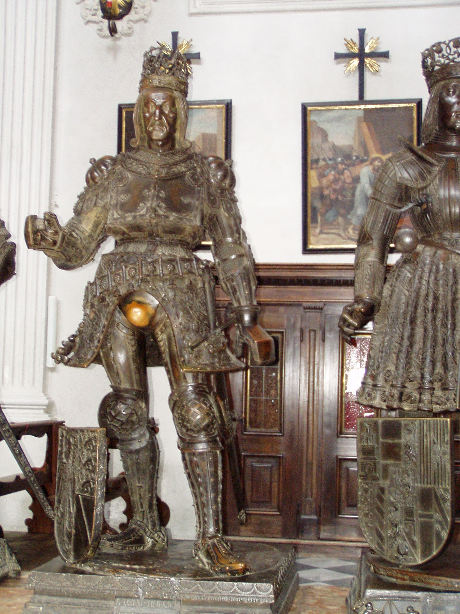 photographie de la statue de l'empereur Rodolphe du Saint-Empire, prise par Accrochoc le 6 juillet 2006 au mausolée de l'empereur Maximilien à Innsbruck (Autriche).